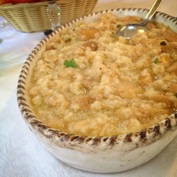 Acquacotta soup, a soup in Italian cuisine